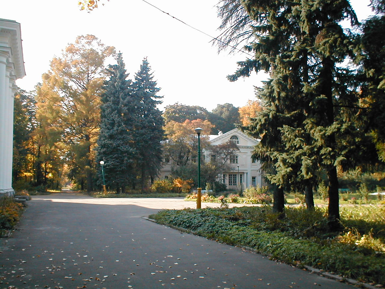 Xviii-ХIХ